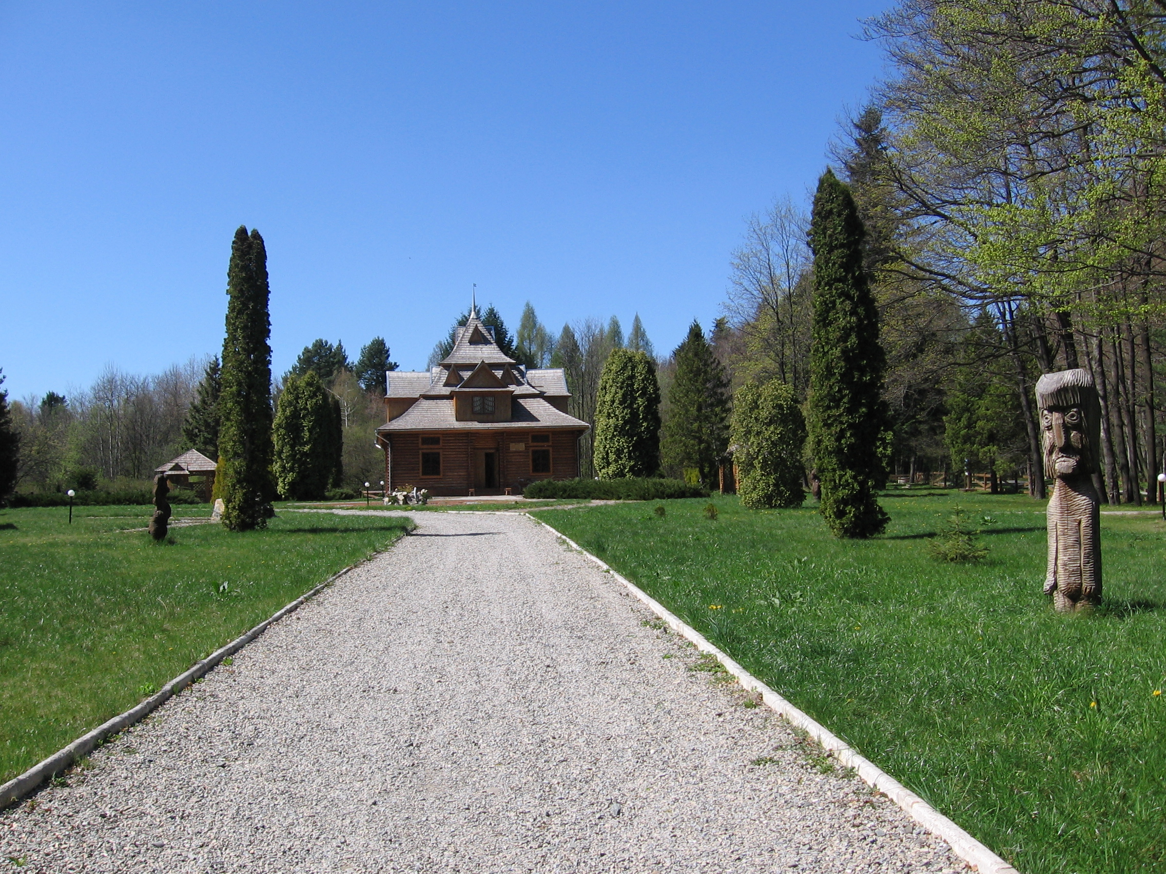 Музей Печеніжинського лісництва Коломийського ДЛГ